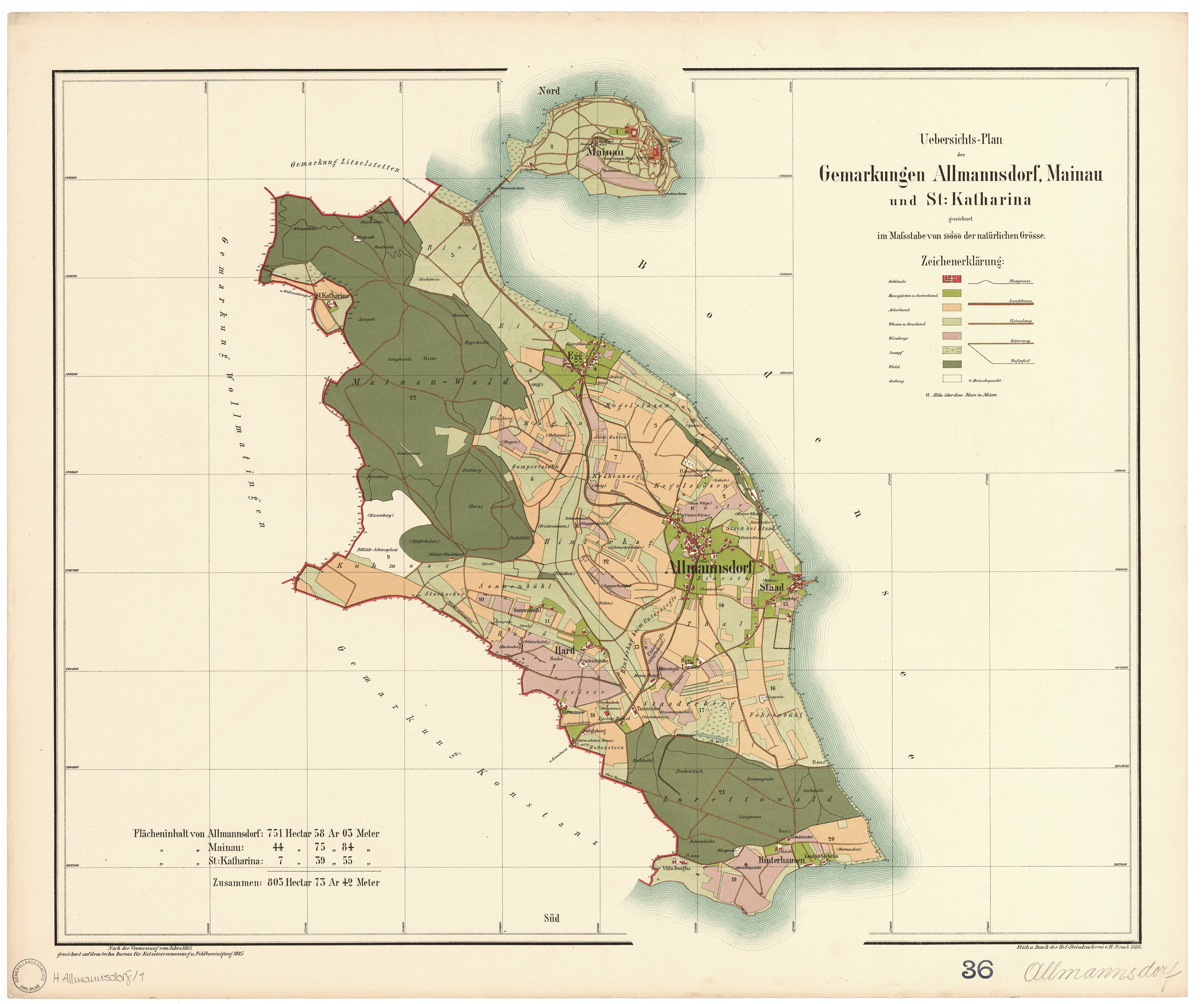 Ehemalige Gemeinde Allmannsdorf, Landkreis Konstanz, Baden-Württemberg: Katasterplan, mit Flurnamen, einschl. Insel Mainau und Kloster St. Katharinen